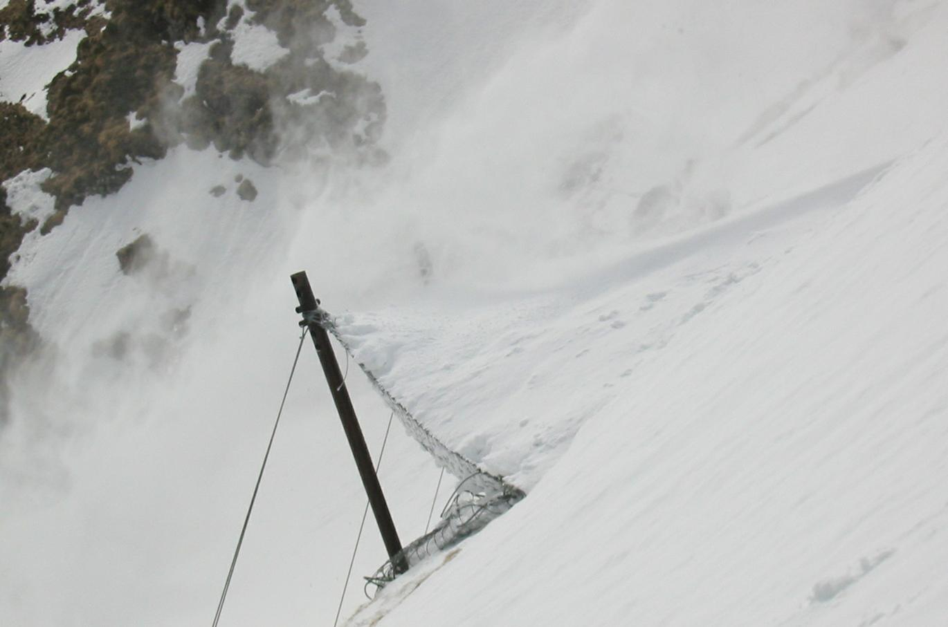 Bariera utrzymująca czapę śniegową